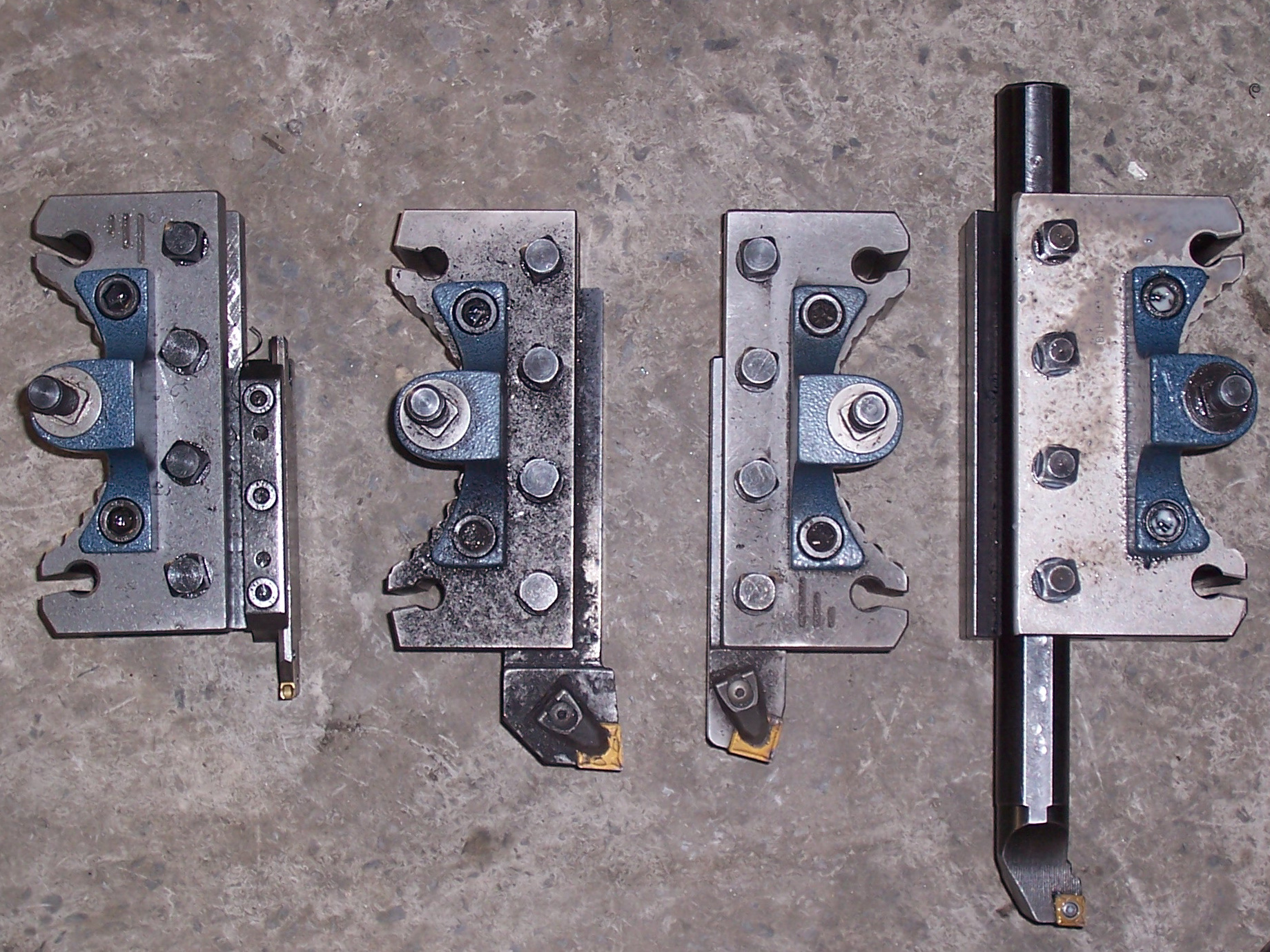 Токарний інструмент